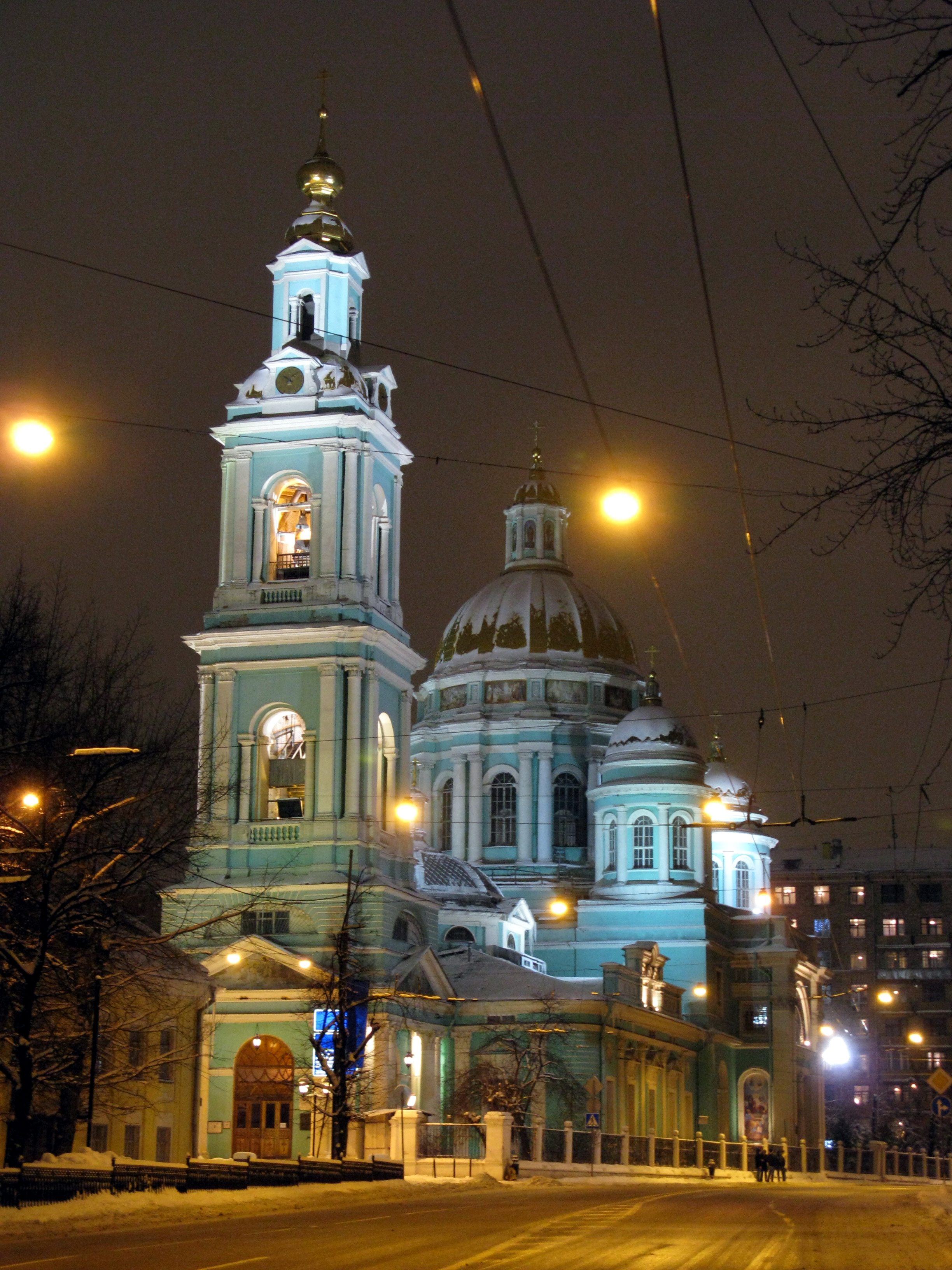 Богоявленский кафедральный собор в Елохове